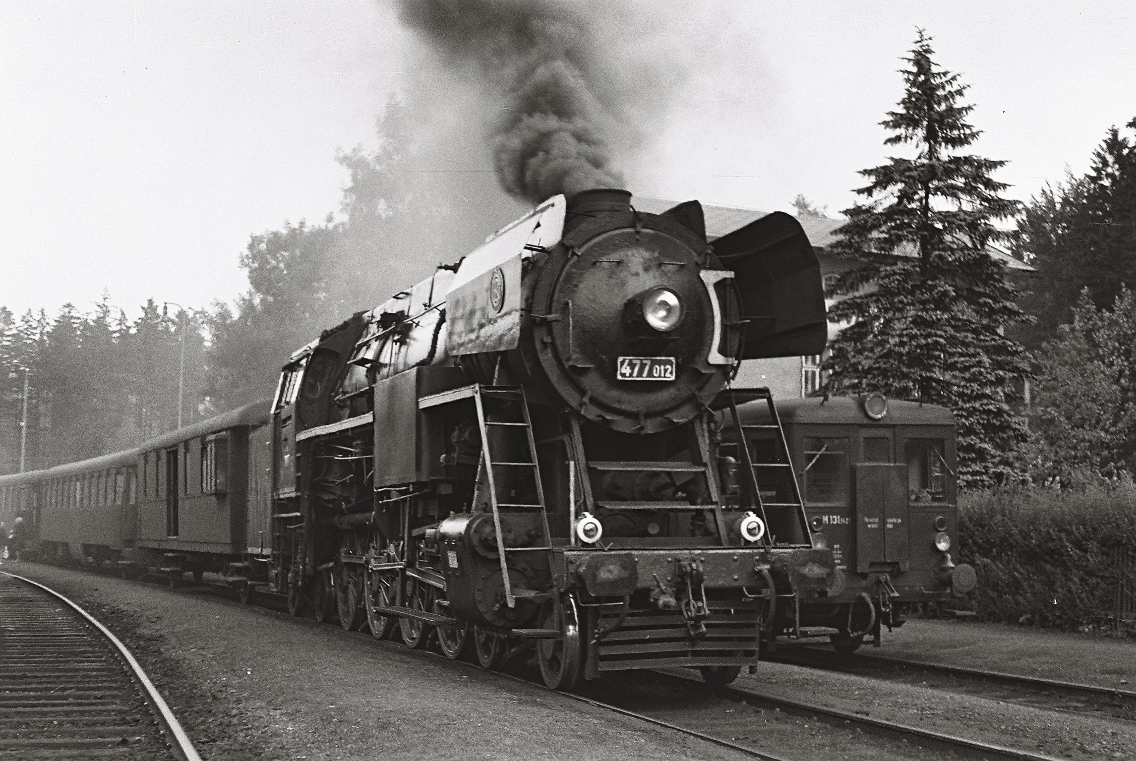 477.012 mit Personenzug 1974 in Jedlová